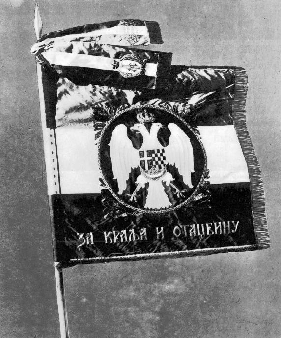 Zastava triglavskega polka